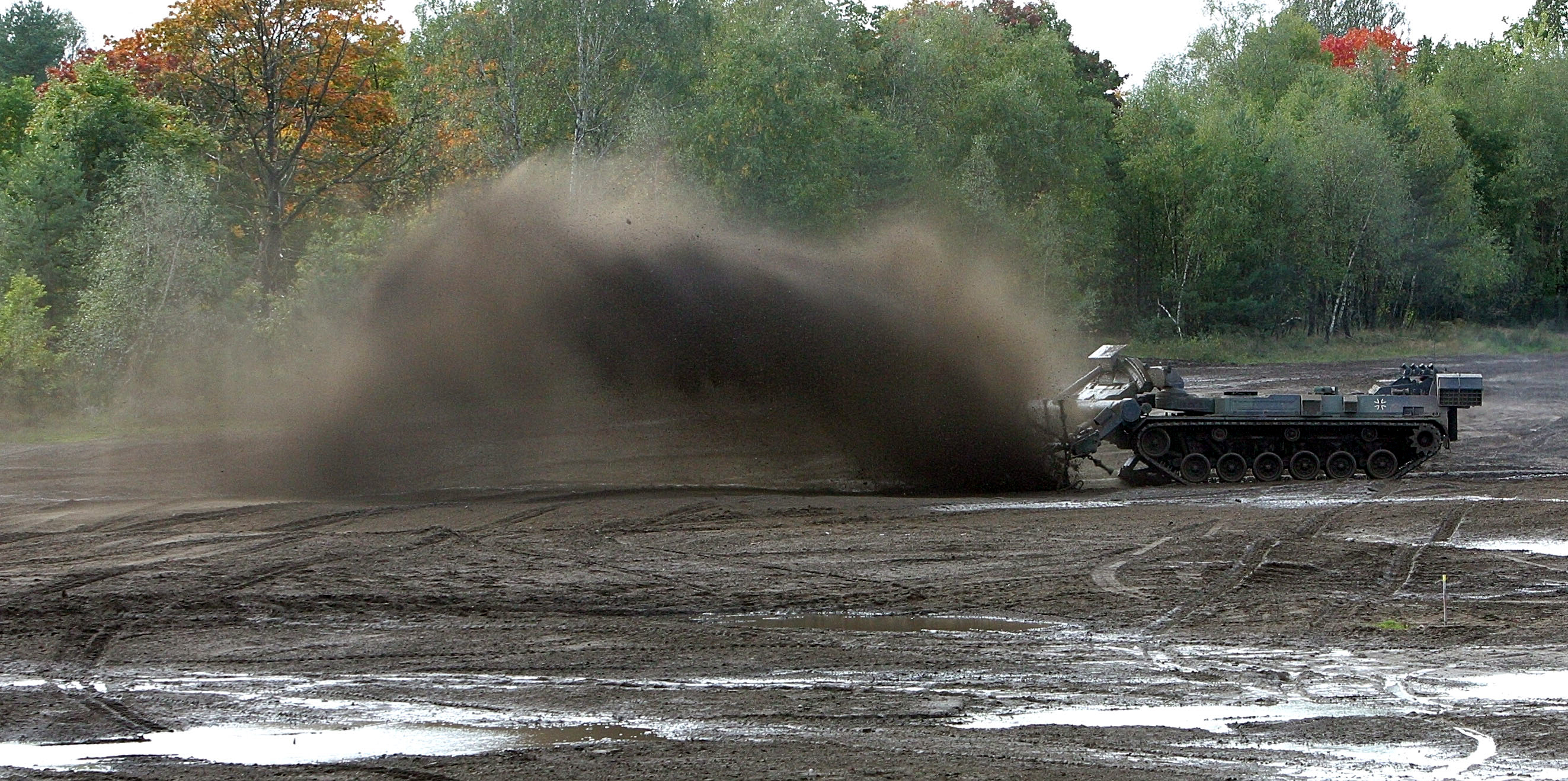 Vorführung des Panzers bei der Minenräumung. ©Bundeswehr/Modes